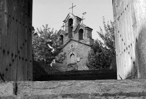 Косово и Метохија: Српска православна црква Светог Стефана у селу велика Хоча. Фотографије из пројекта "Корени душе". Фото:Дарко Дозет